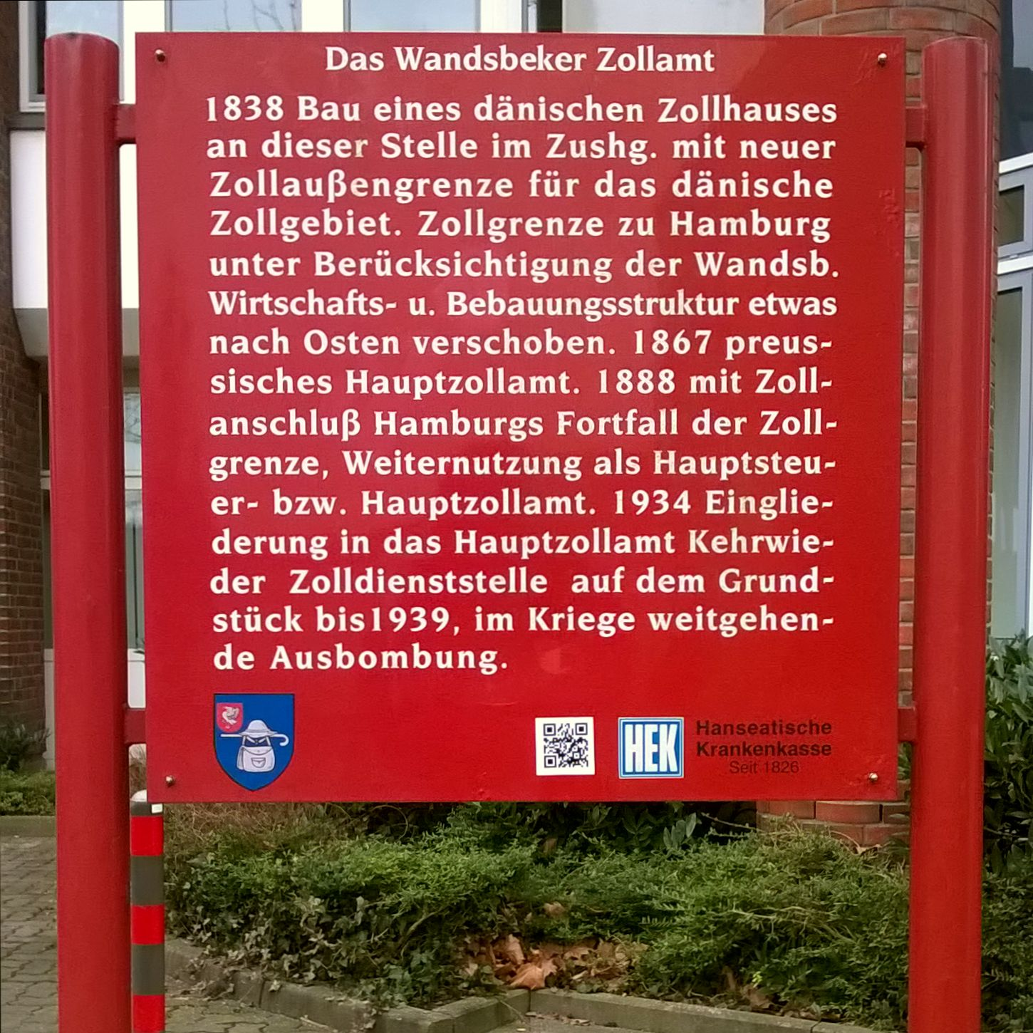 Wandsbeker Tafel o. Nr.: Ehemaliges Zollamt (heute Sitz der HEK Krankenkasse), Wandsbeker Zollstraße 82-90 in Hamburg-Wandsbek